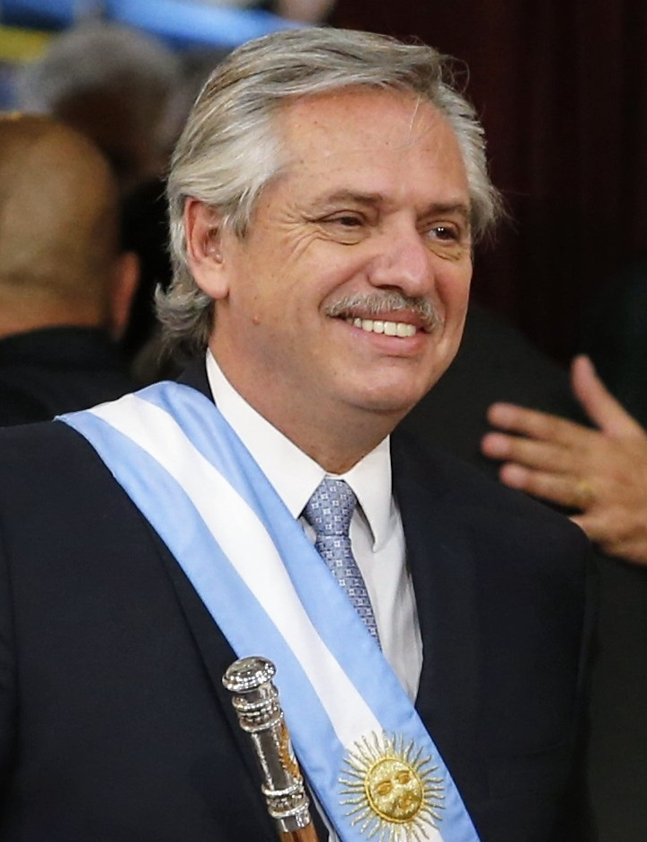 Alberto Fernández al asumir la Presidencia